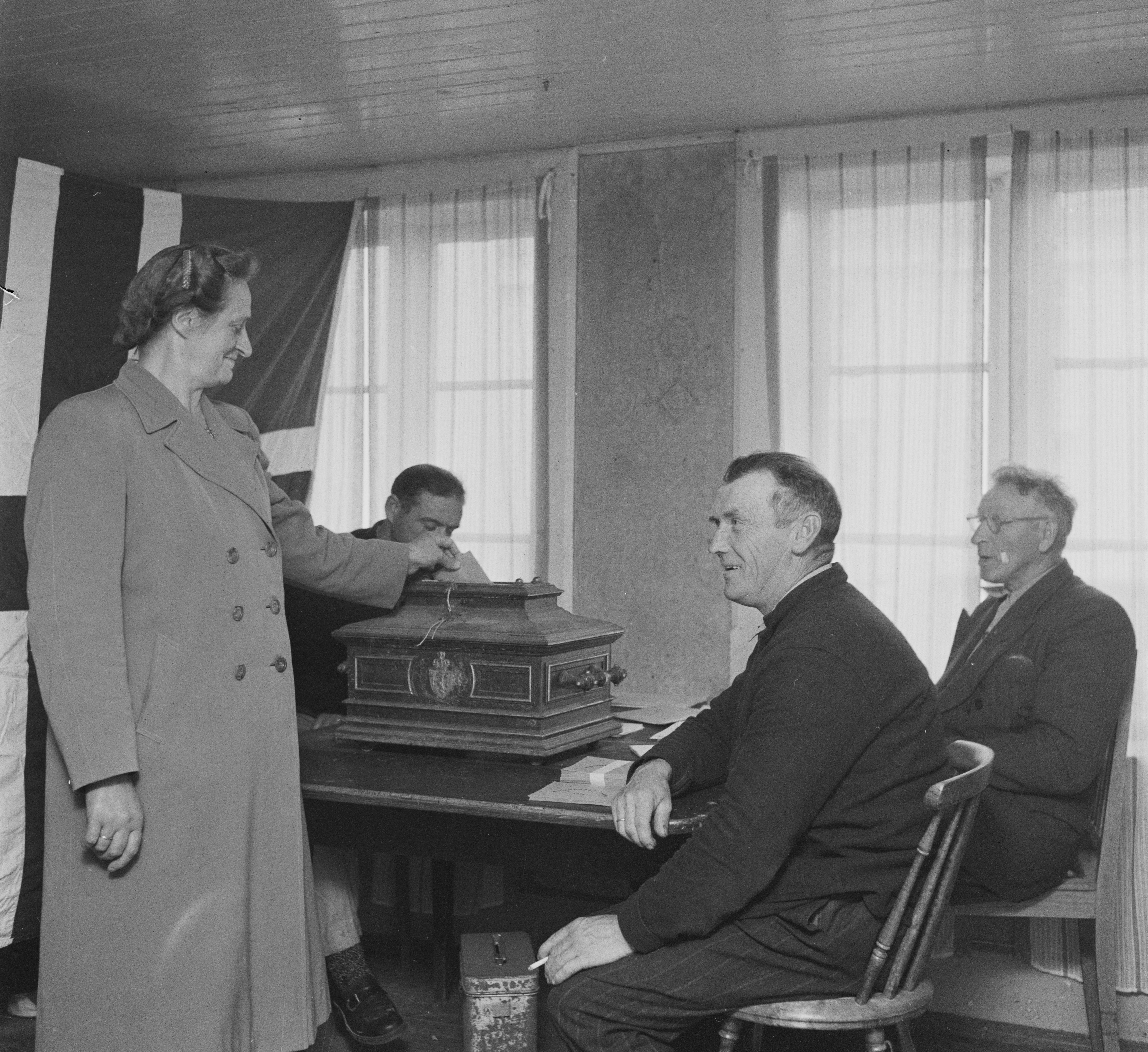 Bildet er hentet fra Arkivverket. Grip. Valg i Norges minste kommune. NÅ nr. 41, 1955. Arkivinstitusjon : Riksarkivet Arkivnavn : Billedbladet NÅ Sted : Norge, Møre og Romsdal, Kristiansund, Grip Avbildet